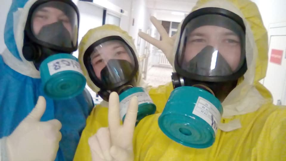 Клиника БГМУ-госпиталь